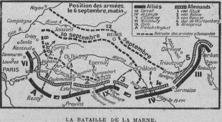 bataille de la Marne, retrait des allemands ou première bataille de l'Aisne. septembre 1914